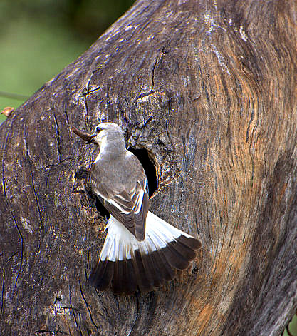 White-rumped Monjita (Xolmis velatus) EPR - VIVEIRO DE MUDAS NATIVAS - Fazenda Vô-Vó - Piraju-SP .br/index.php.htm